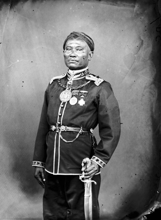 Negatief. Soeria Winata, regent van Martapura, Borneo